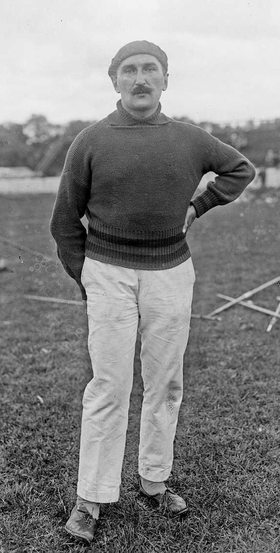 16-7-22, Colombes, championnat de France [d'athlétisme, Paul] Béranger, champion du disque : [photographie de presse] / [Agence Rol]